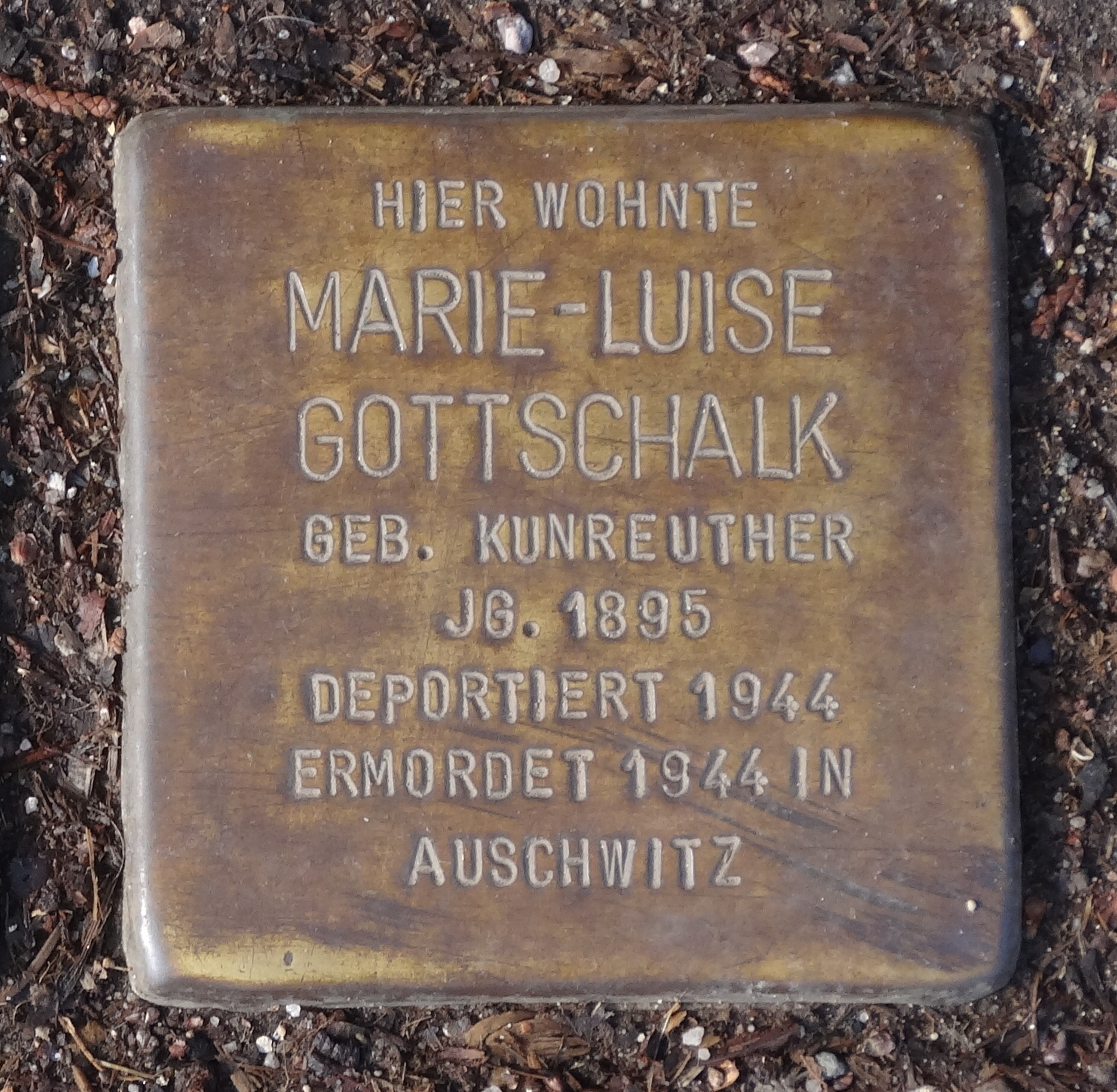 Stolperstein in Gotha, Friedrichstr. 14, für Marie-Luise Gottschalk